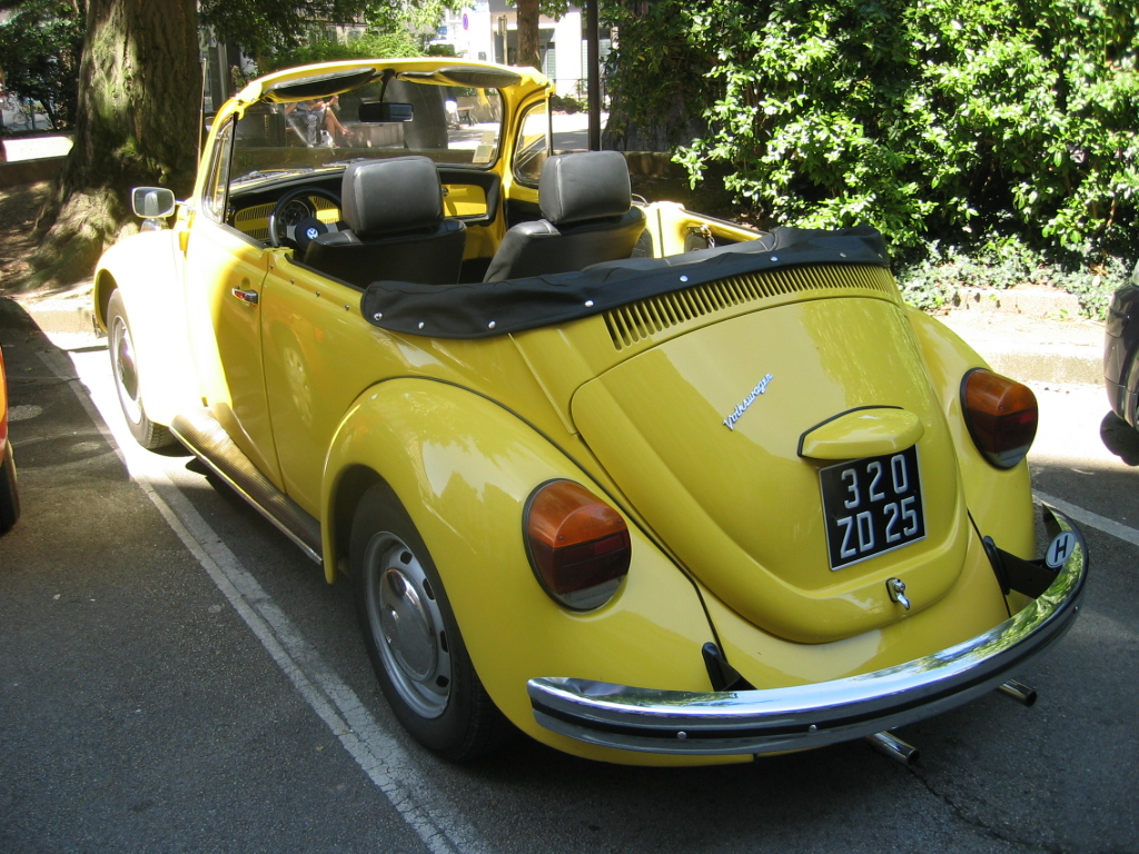 Cocinelle Volkswagen Type 1